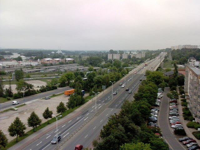 Neubrandenburg (Meklemburgia – Pomorze Przednie, Niemcy). Woldegker Straße.